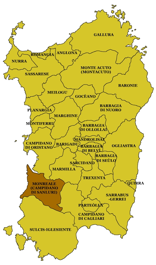 Sardinian Subregions